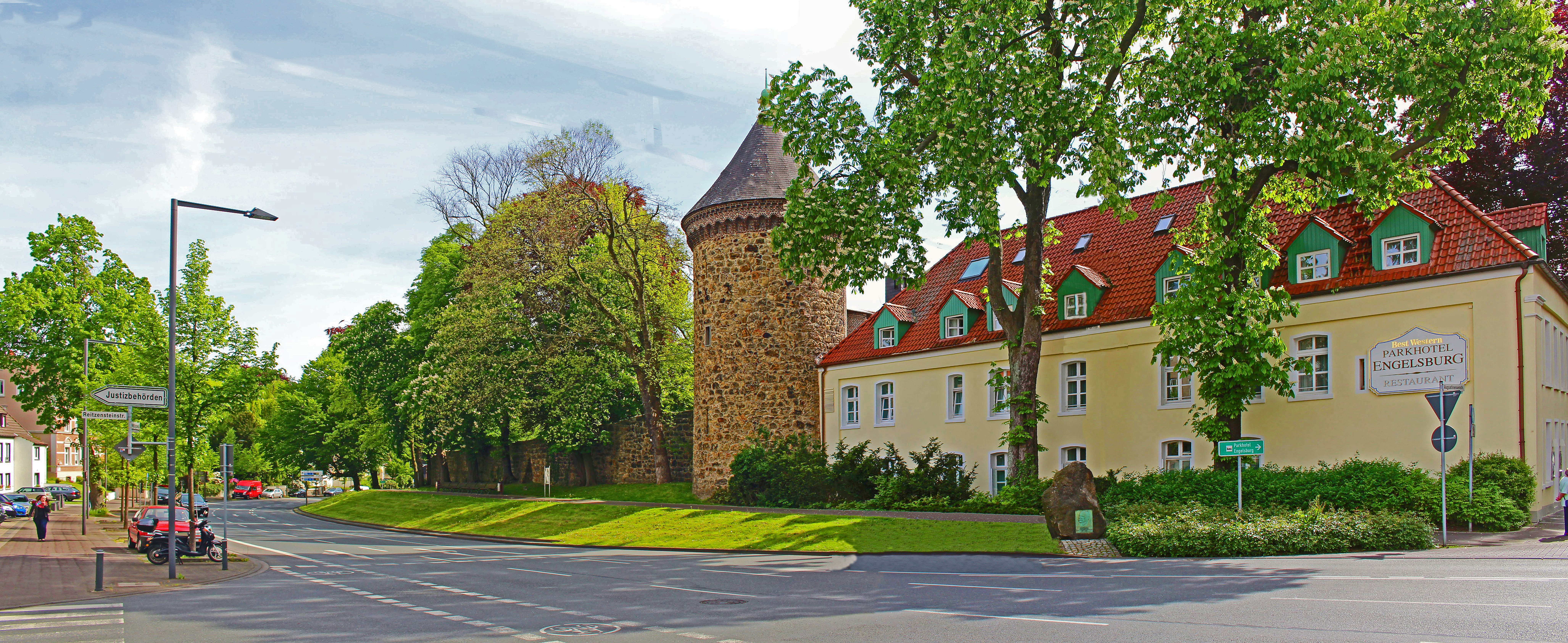 Stadtmauer, Stephansturm und Westflügel der "Engelsburg" - Recklinghausen, Nordrhein-Westfalen, Deutschland